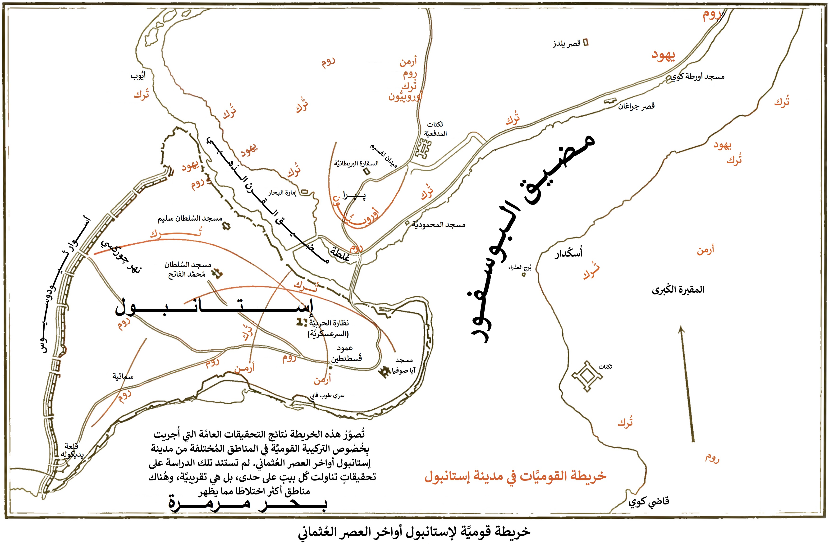 خريطة تُظهر التوزُّع القومي في مدينة إستانبول سنة 1922 قُبيل الزوال الفعلي للدولة العُثمانيَّة.